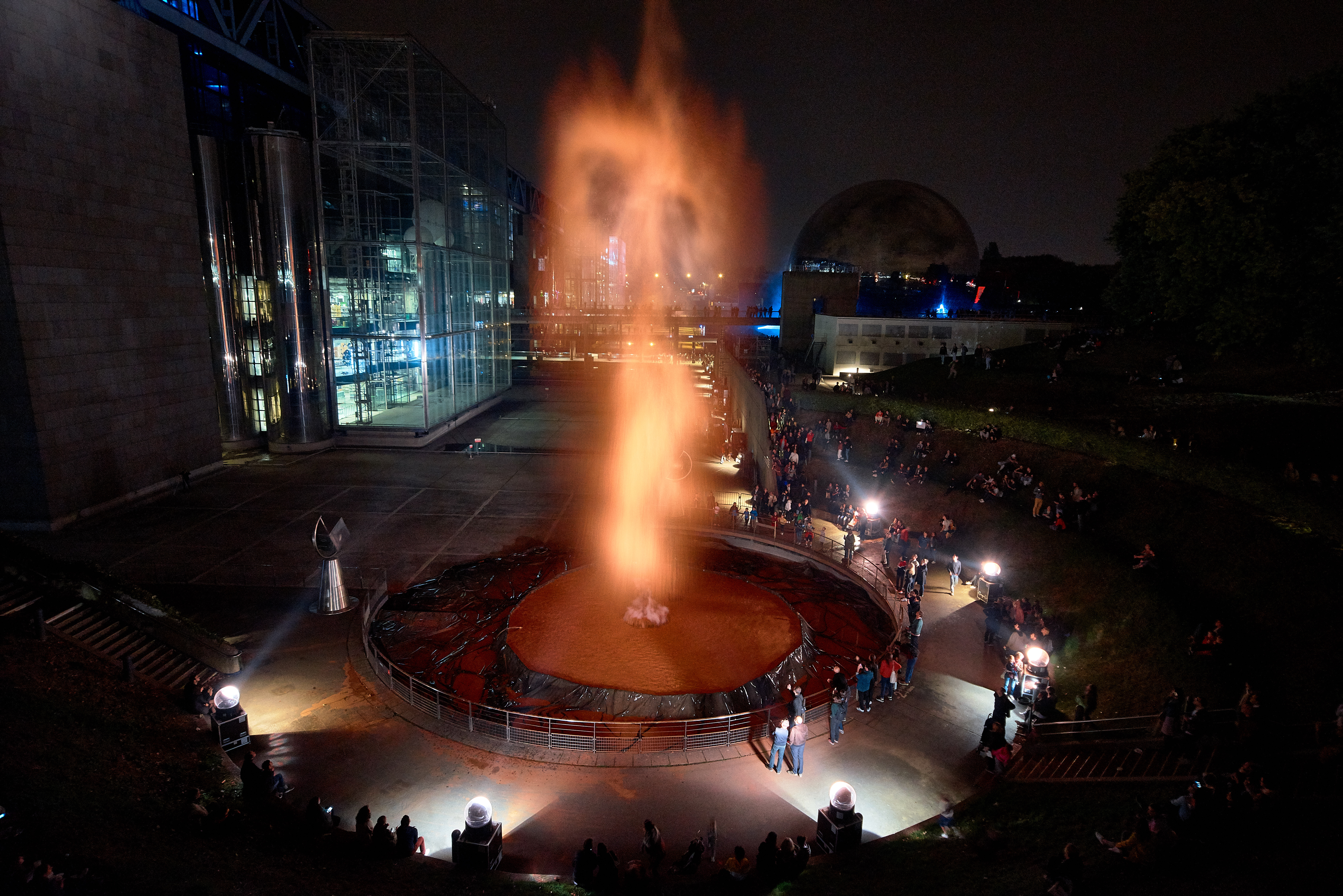 Geysa Fabien Leaustic